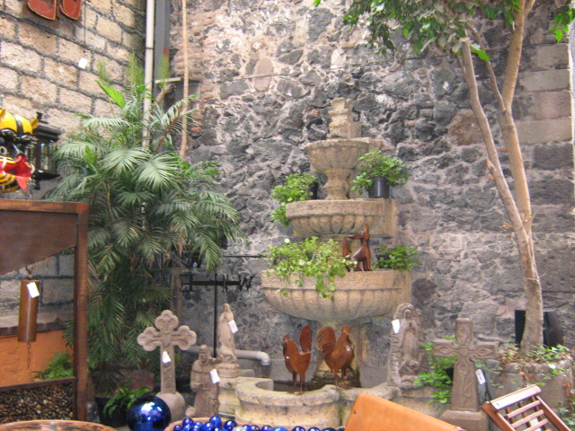 Artesanias en comercios vecinos a la Plaza de San Jacinto en San Angel, Mexico, DF.